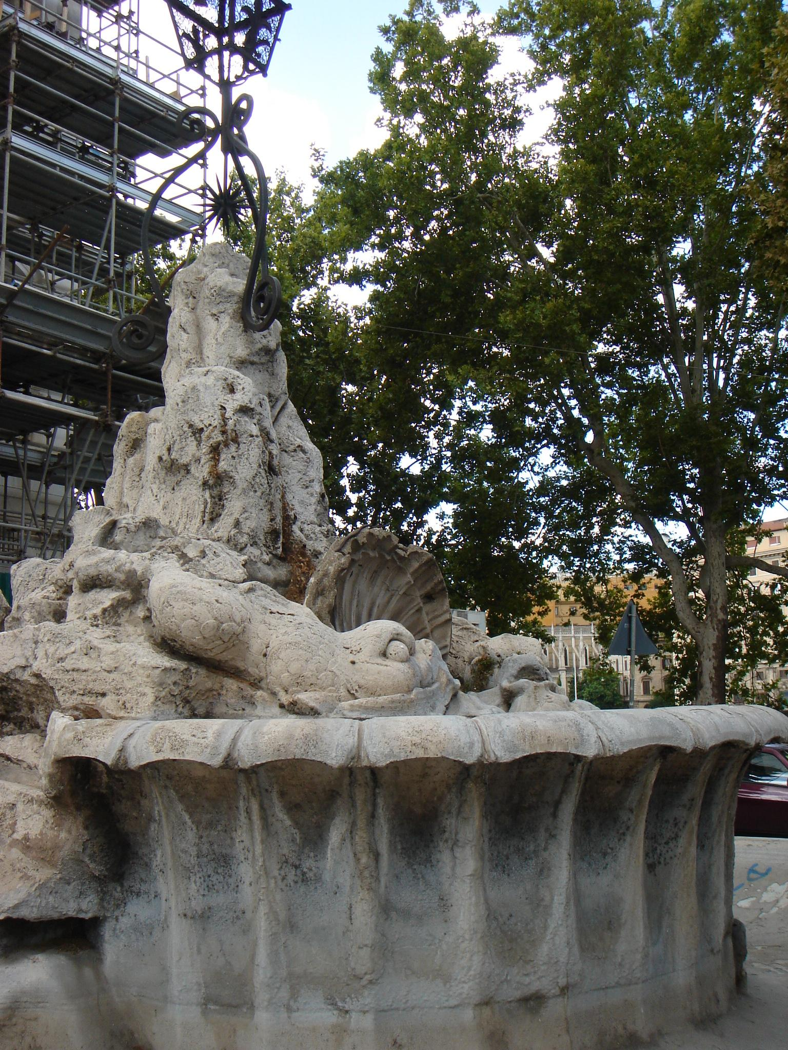 Roma, Campo Marzio: fontana già del Porto di Ripetta